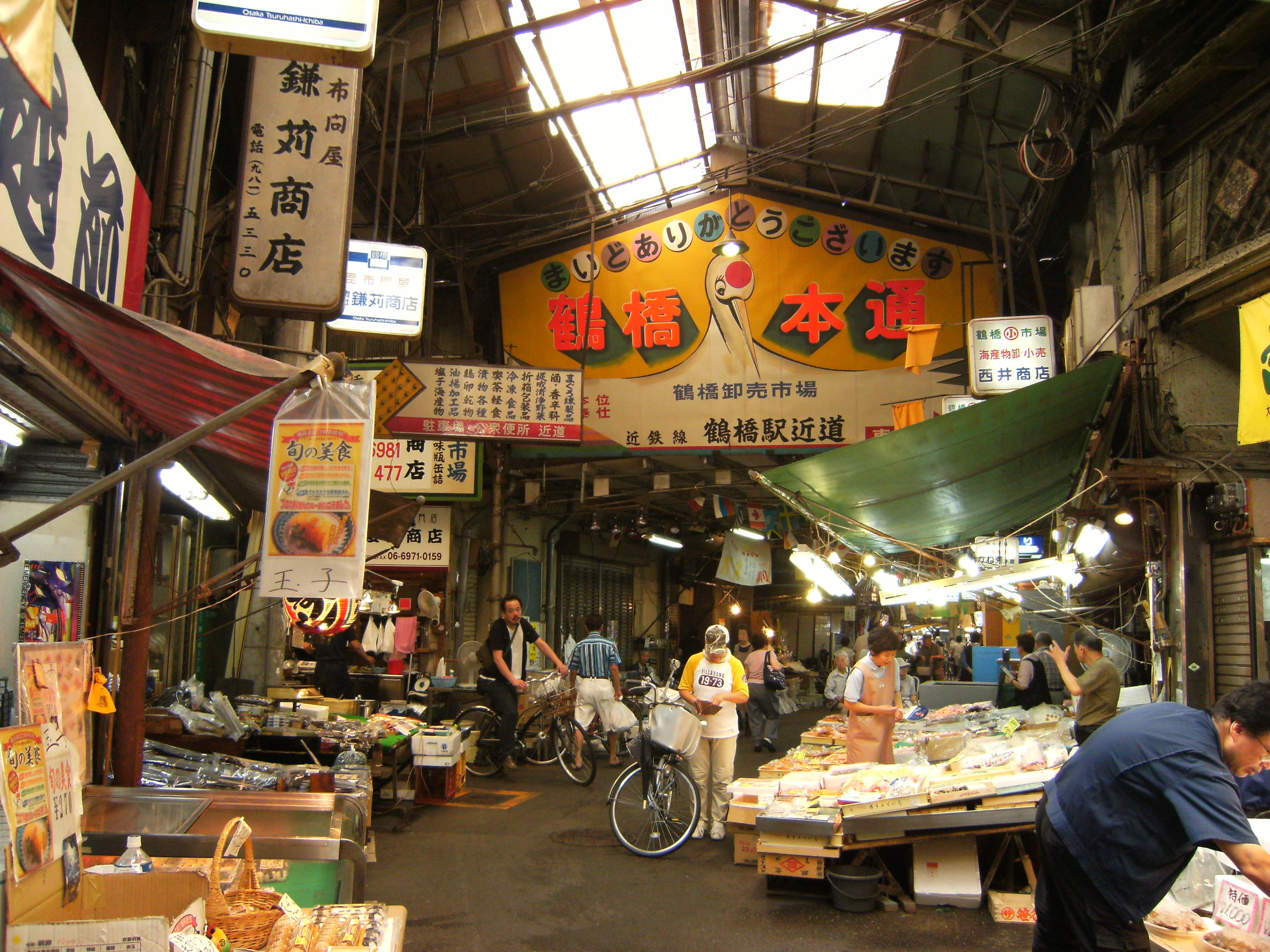 鶴橋商店街